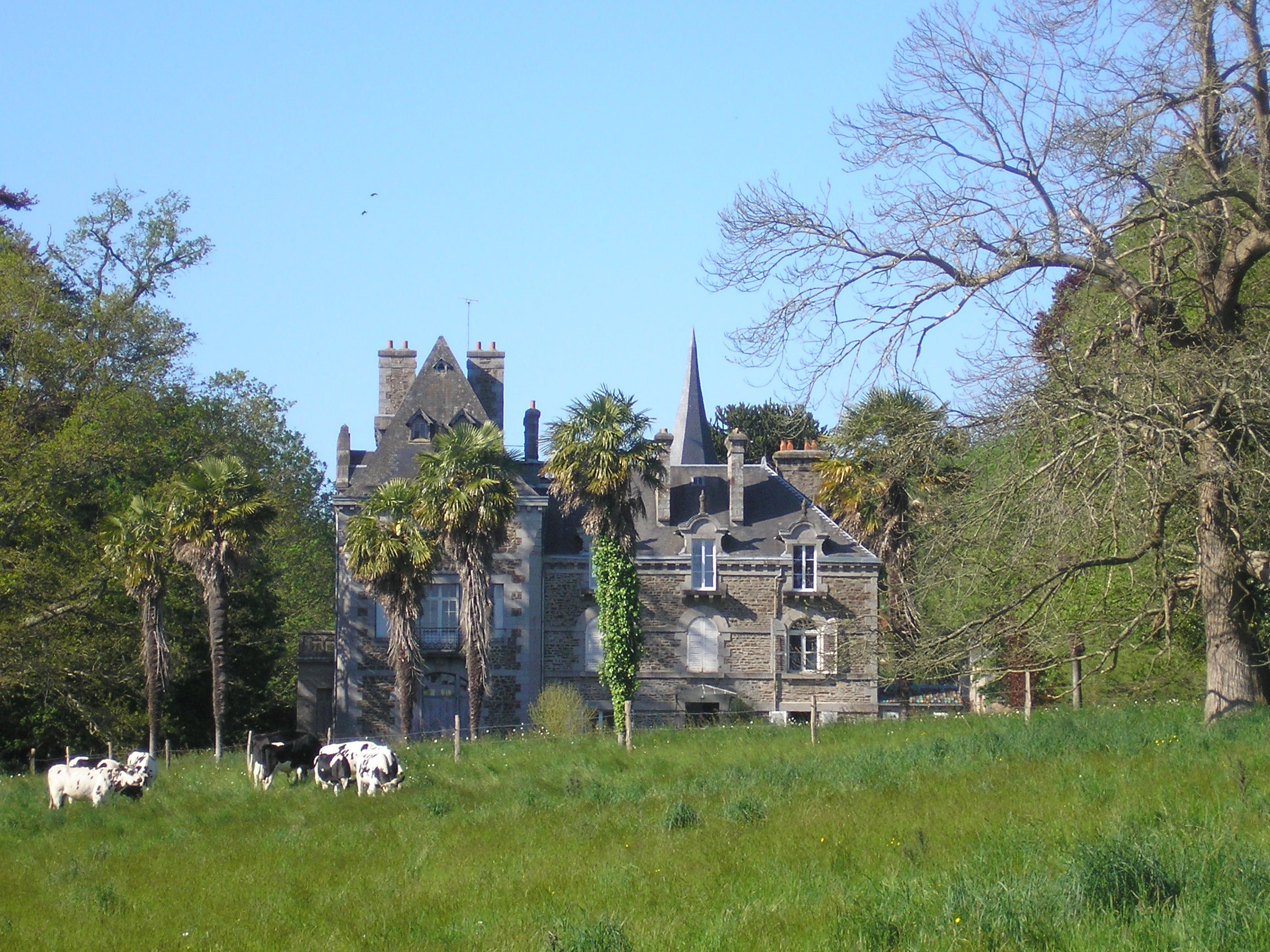 Plomb (Normandie, France). Le château de la Foulerie.